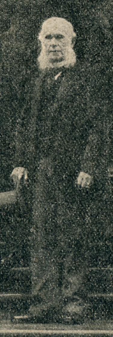 Барон Стааль - председатель Гаагской мирной конференции 1899 года.